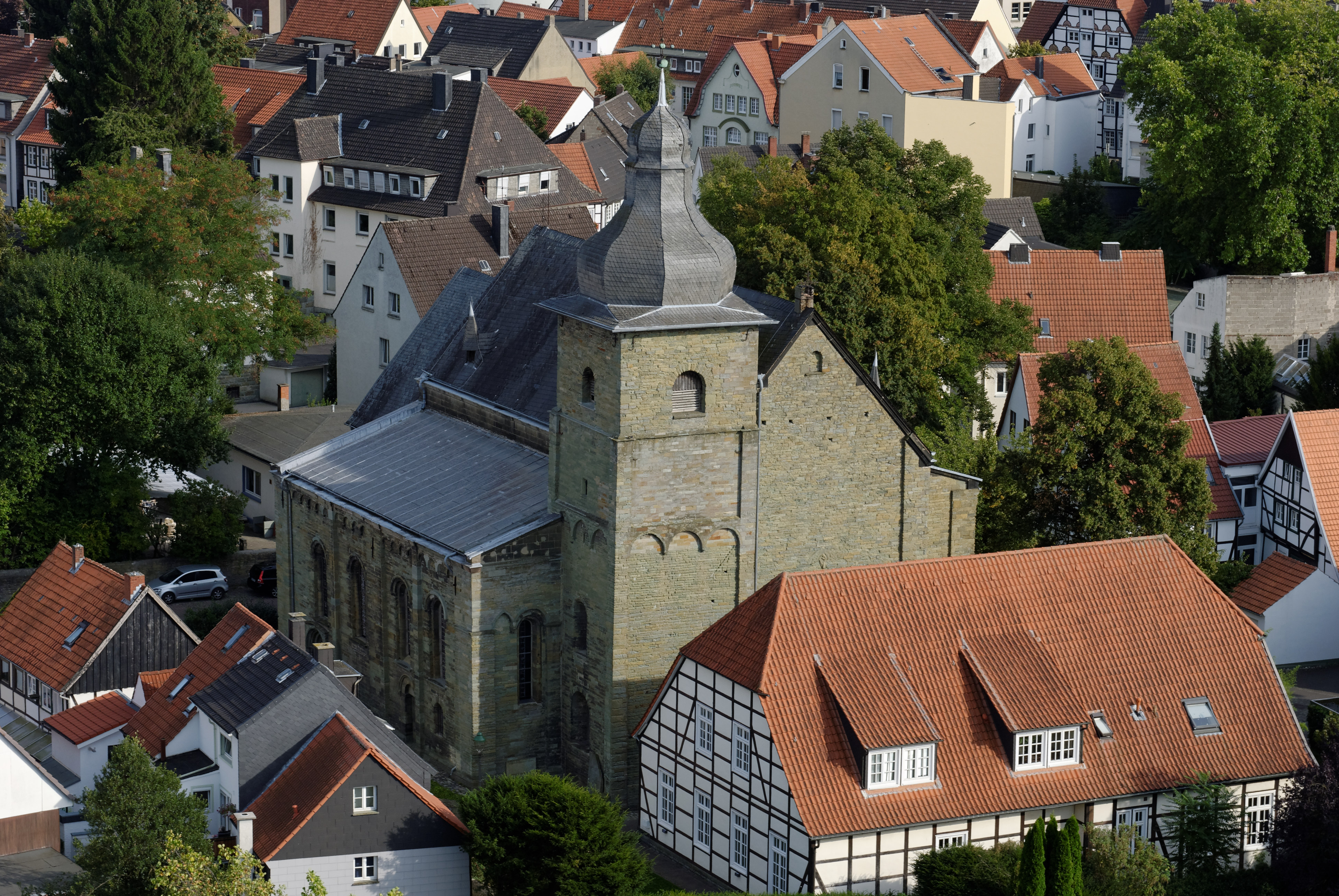 St. Maria zur Höhe vom Nordturm der Kirche St. Maria zur Wiese fotografiertThis is a photograph of an architectural monument., no. 363